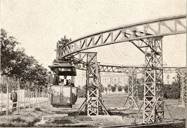 Elevated monorail by Ippolit W. Romanow in the city of Gatchina